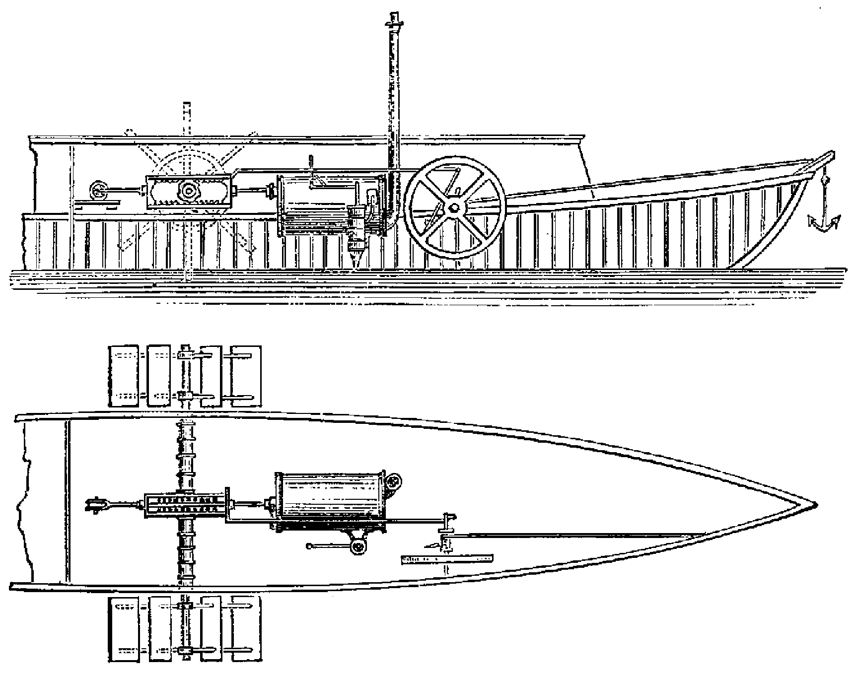 Mécanisme moteur du bateau à roues du marquis de Jouffroy (coupe et élévation)